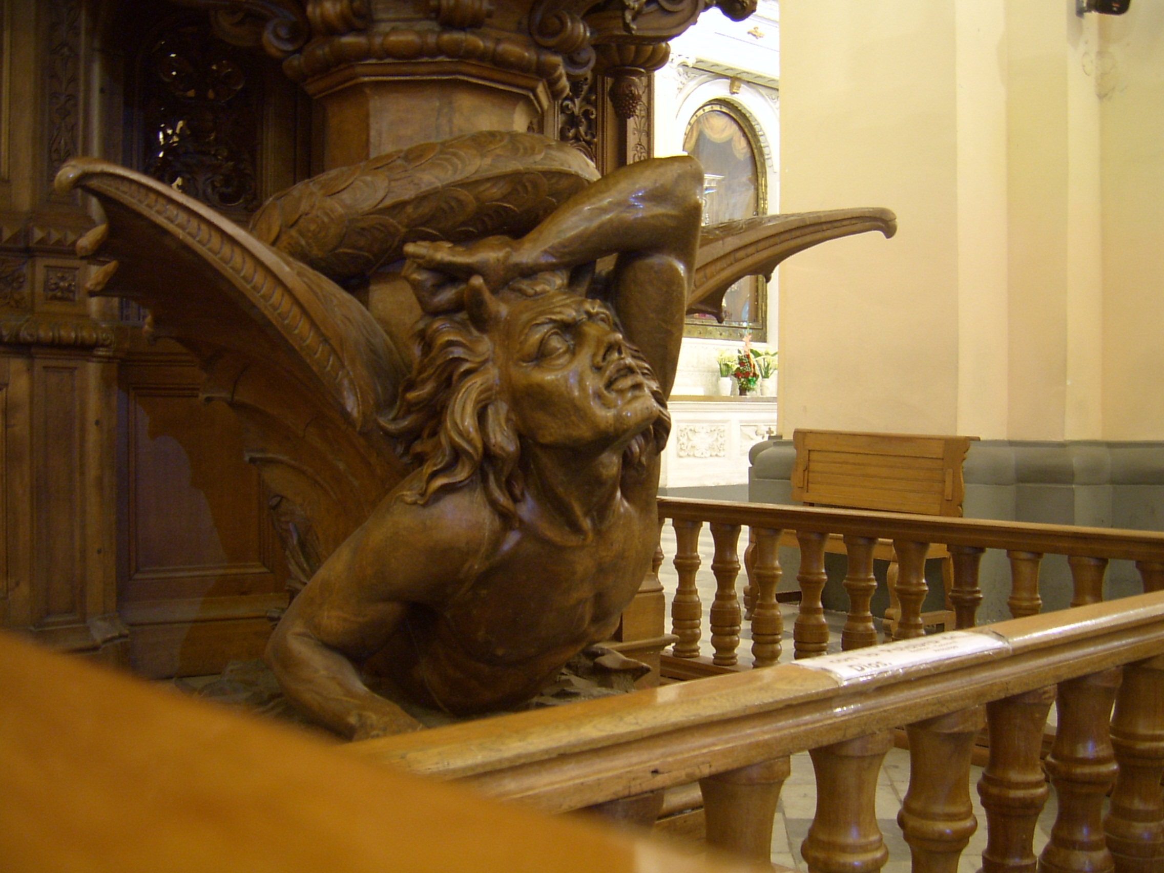 Detalle del demonio tallada en madera que se encuentra en la Catedral de la ciudad de Arequipa, Perú